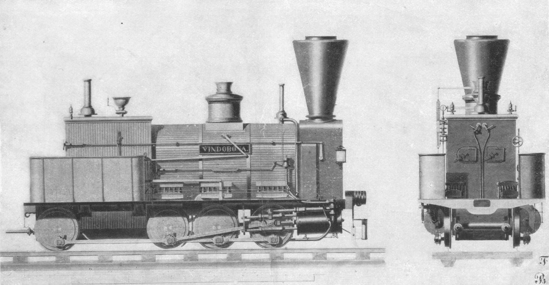 Vindobona der österreichischen Südbahn